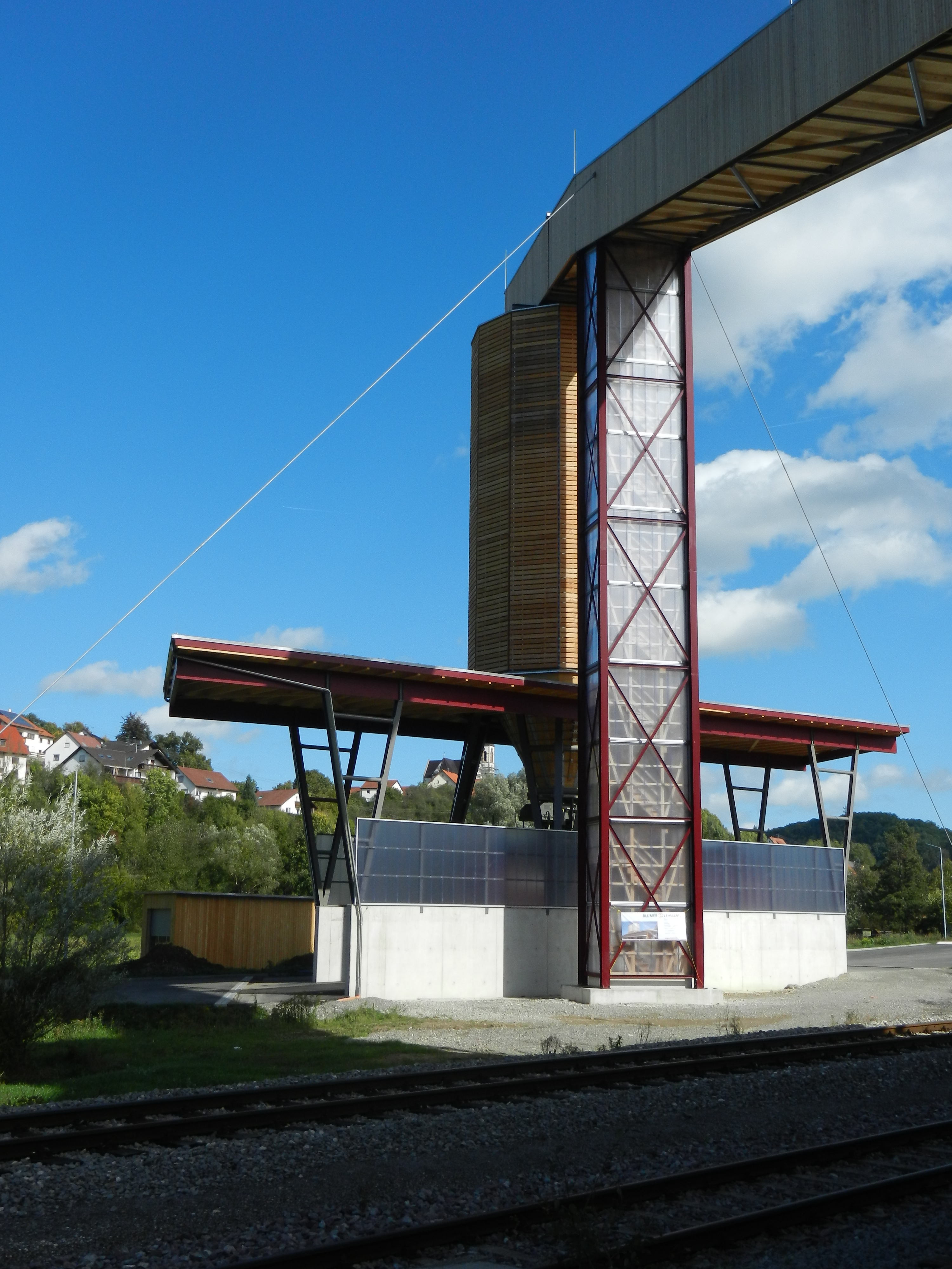 Salzbergwerk Stetten bei Haigerloch, LKW-Verladeturm